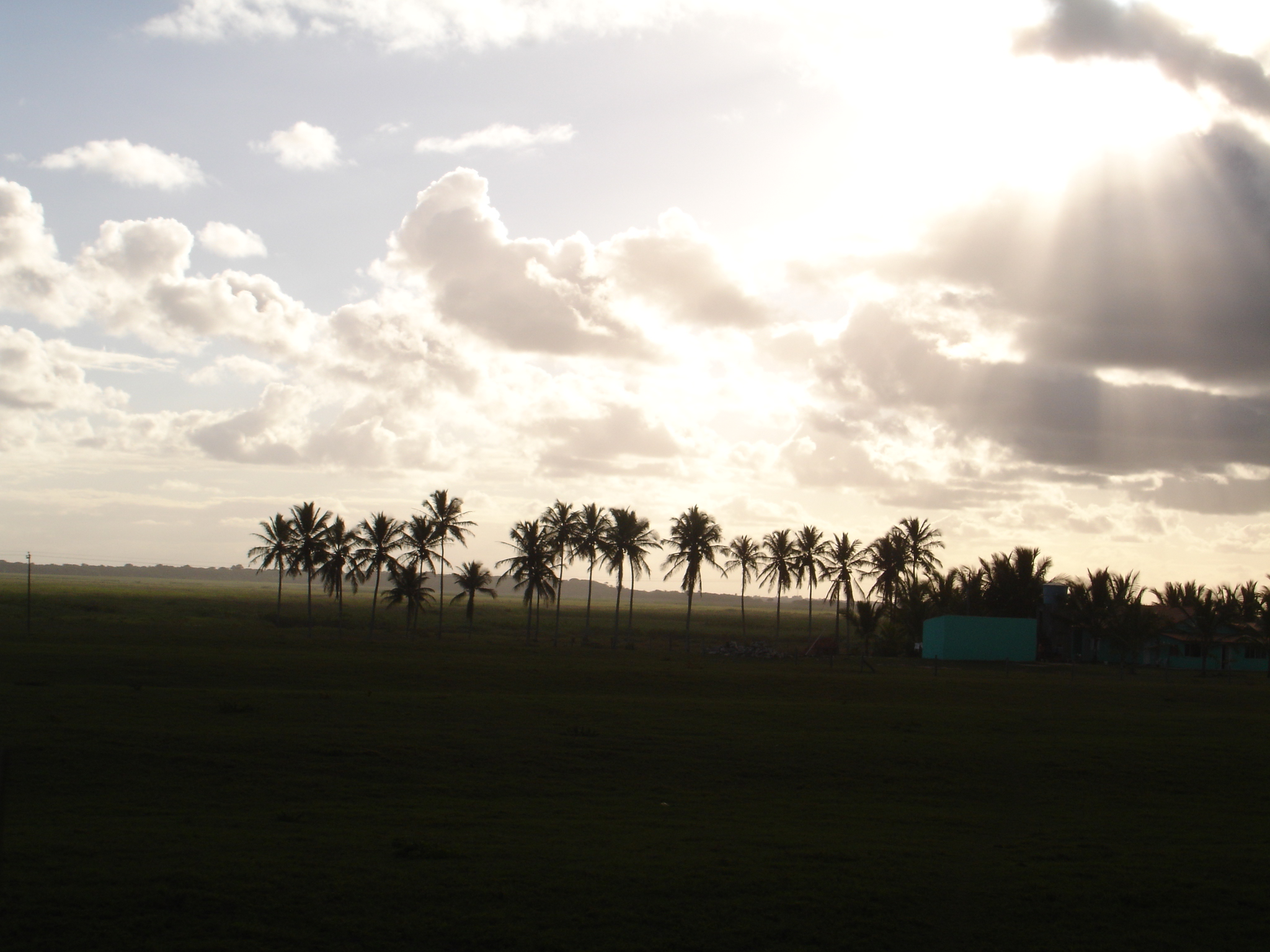 Cidade de Guarapari, Espírito Santo, Brasil.